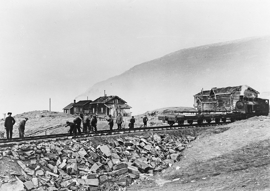 Sulitjelmabanens nyanlegg. Skinnelegging ved Reinhaugen. I bakgrunnen noe av den eldste bebyggelsen i Sulitjelma, tre bygninger vises. Togsett i høyre billedkant. Jernbanespor og anleggsarbeidere. 1914 Produsent, antatt: Hugaas, Arne